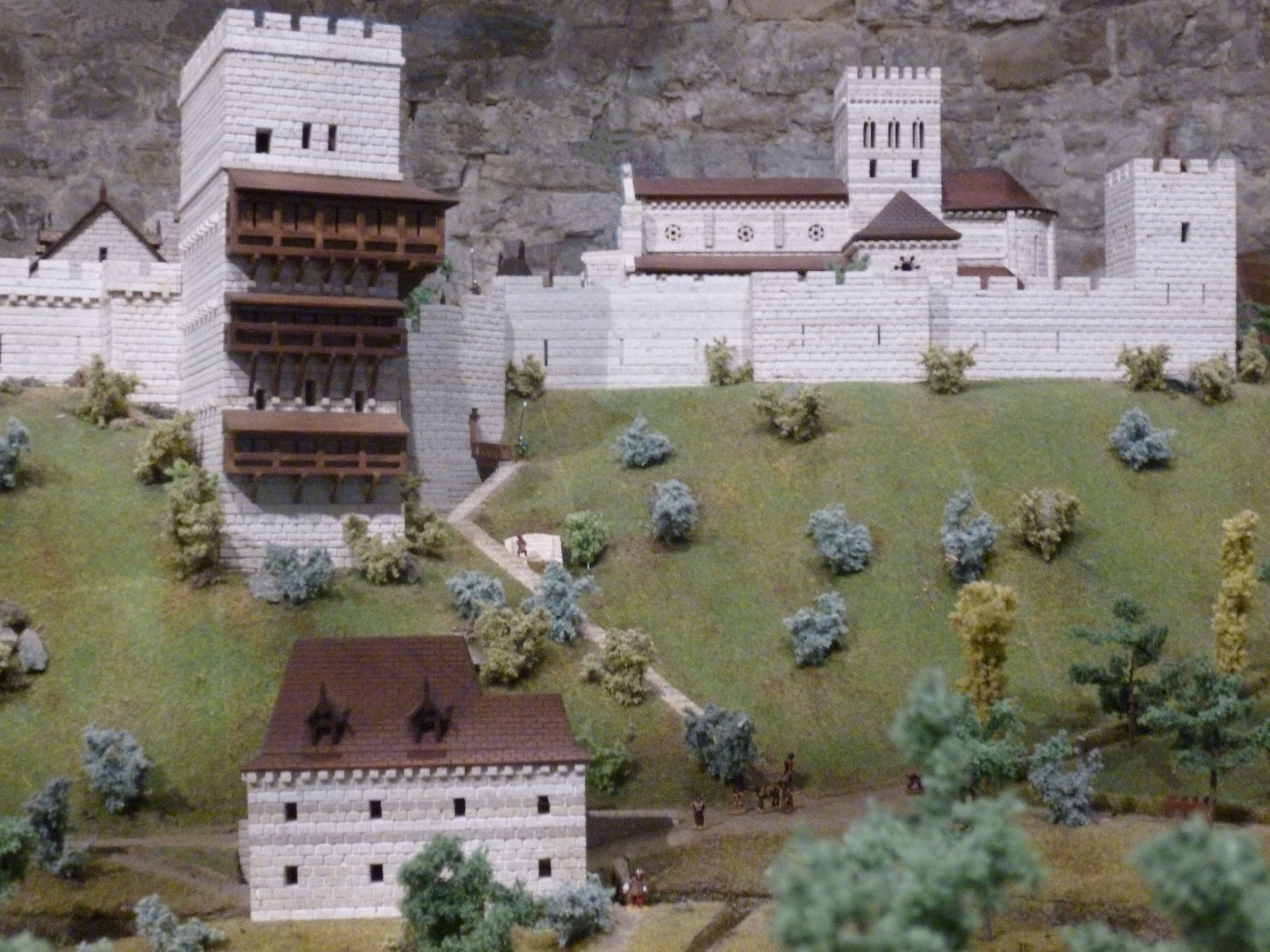 Tour Monréal, église Saint-André.